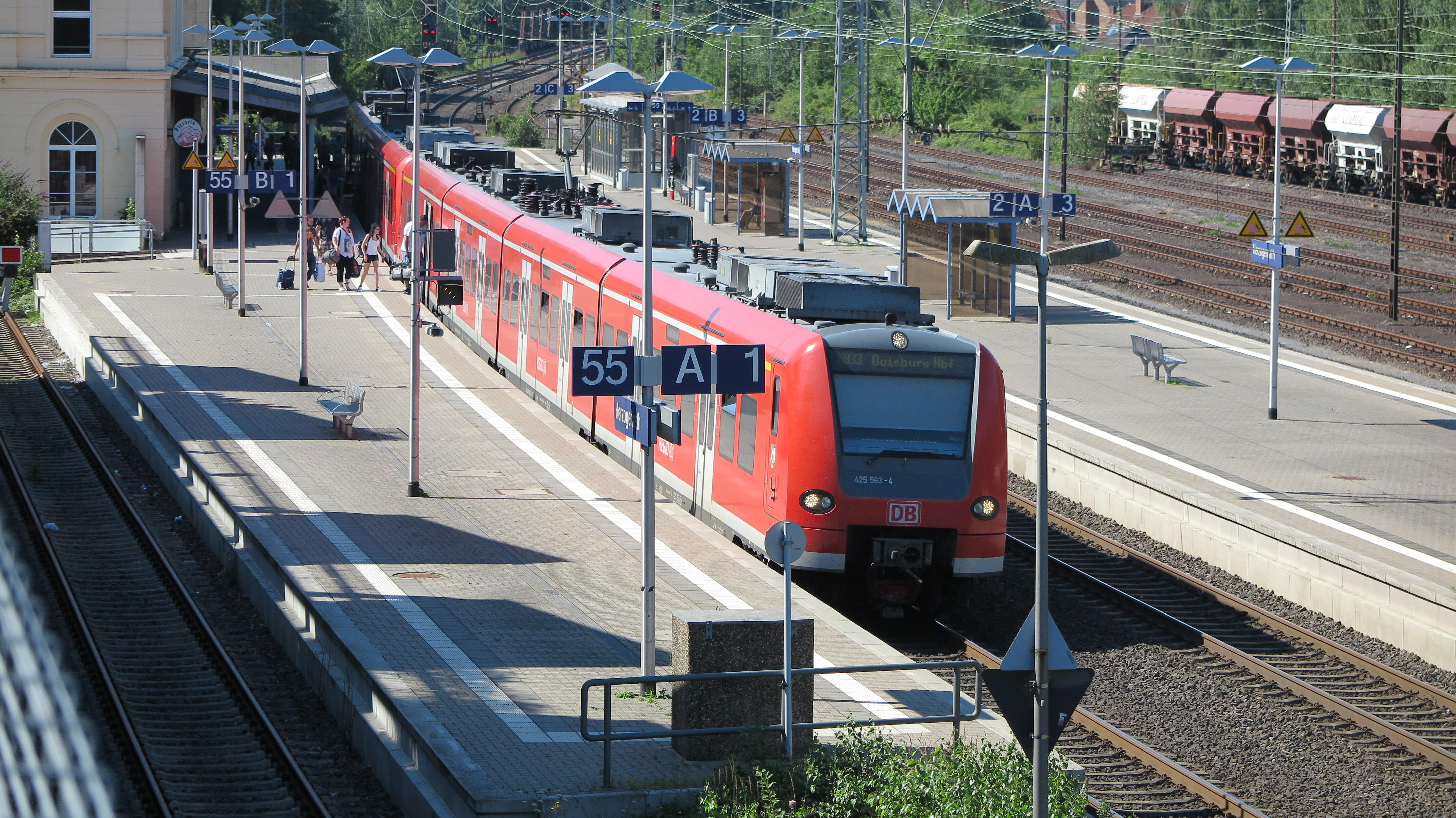 Bahnhof Herzogenrath mit zwei Triebwagen der DB Baureihe 425 an Gleis 1 als Regionalbahn RB33 (Rhein-Niers-Bahn) von Aachen Hbf nach Duisburg Hbf (1. Zugteil) bzw. Heinsberg (2. Zugteil).